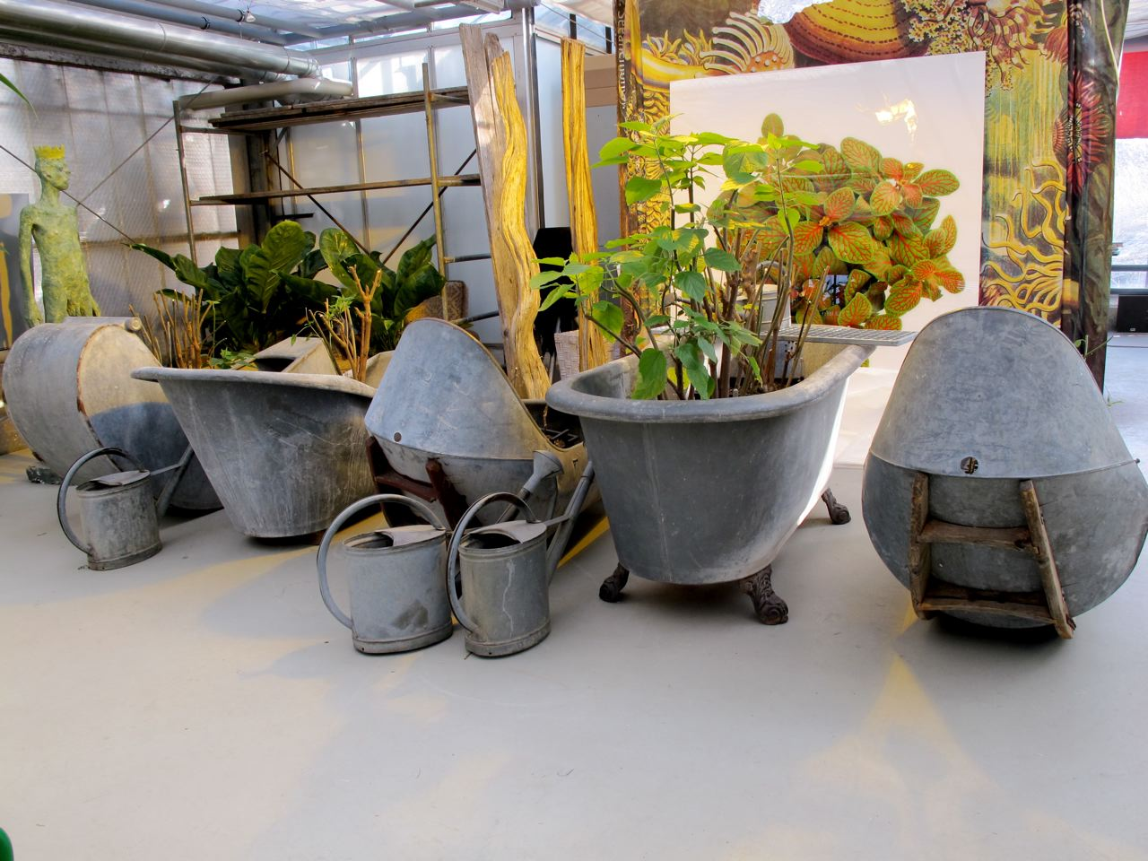 Pflanzeninstallation mit einer Auswahl verzinkter Blechbadewannen in der Kunst- und Lustgärtnerei im Schlosspark Schleißheim(Künstler: Martin Weimar)